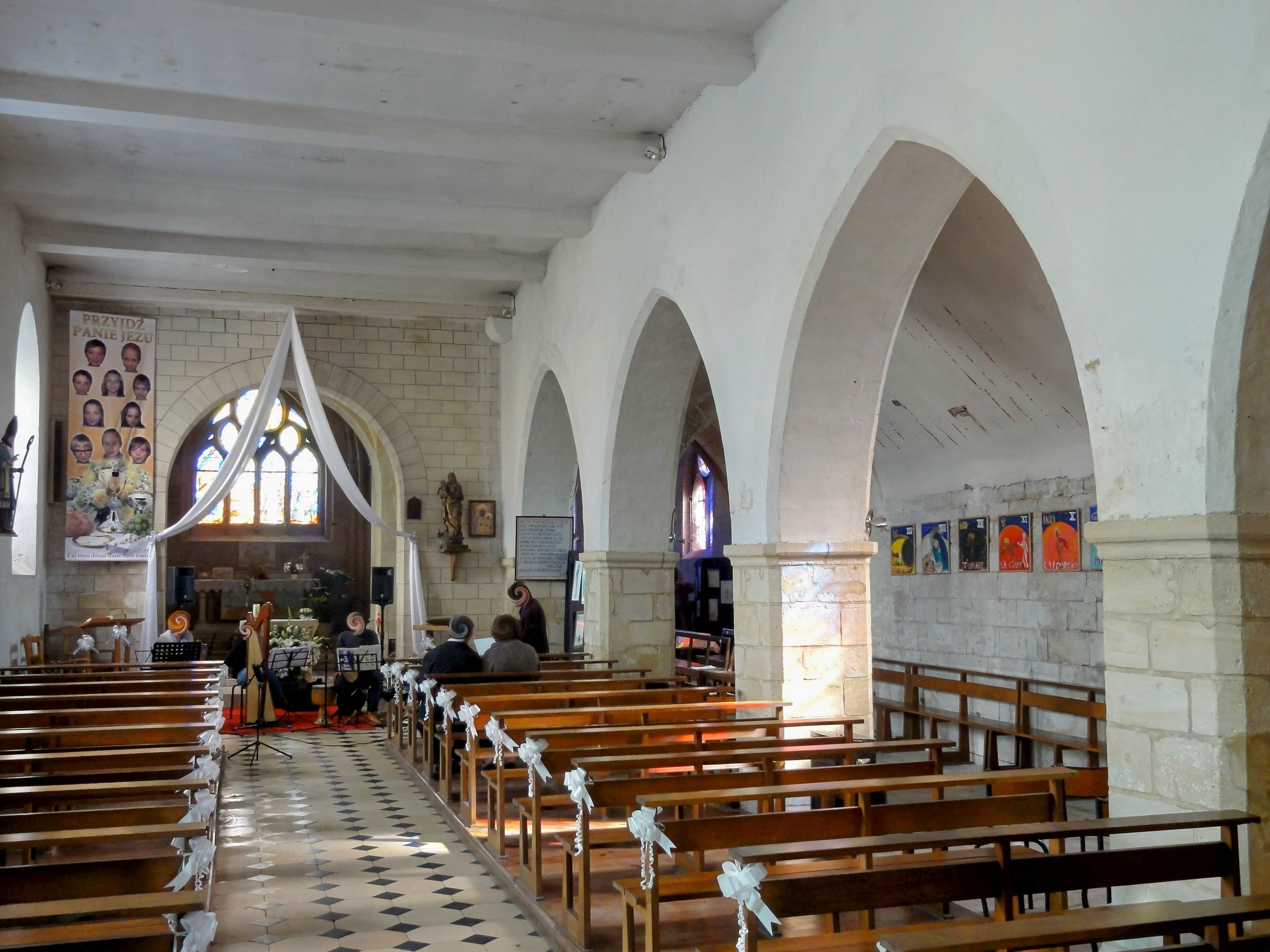 Nef ; vue depuis l'entrée.